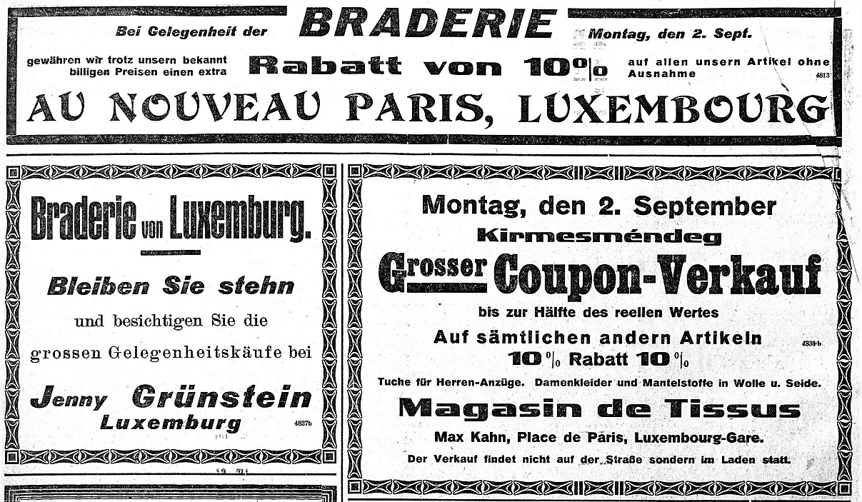 Annoncen aus dem Luxemburger Wort vum 31.08.1929